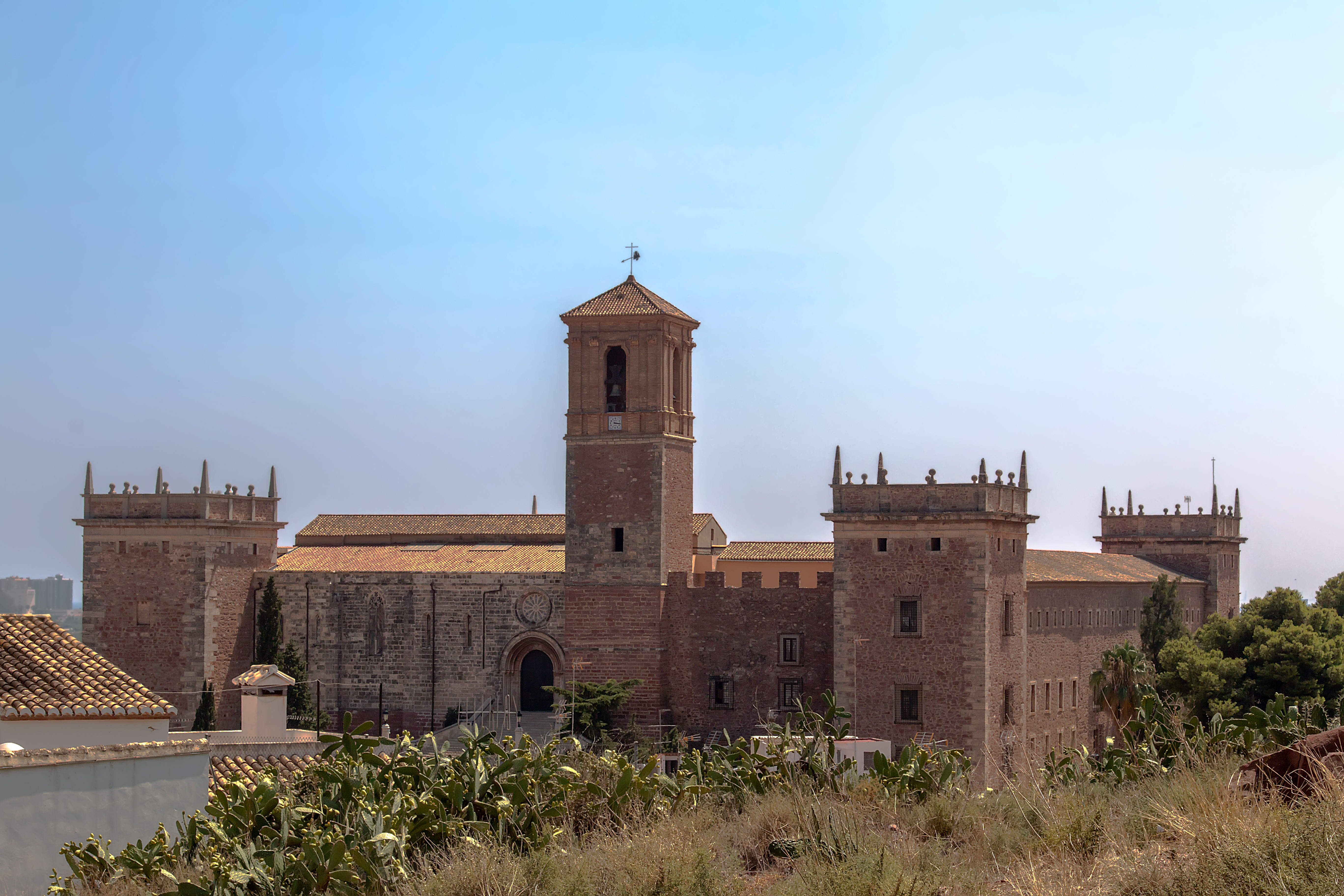 Монастырь в "El Puig". Вид со спуска на улицу "Del Rei En Jaume".